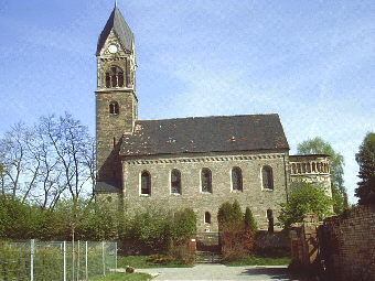 Bündorfer Kirchenruine